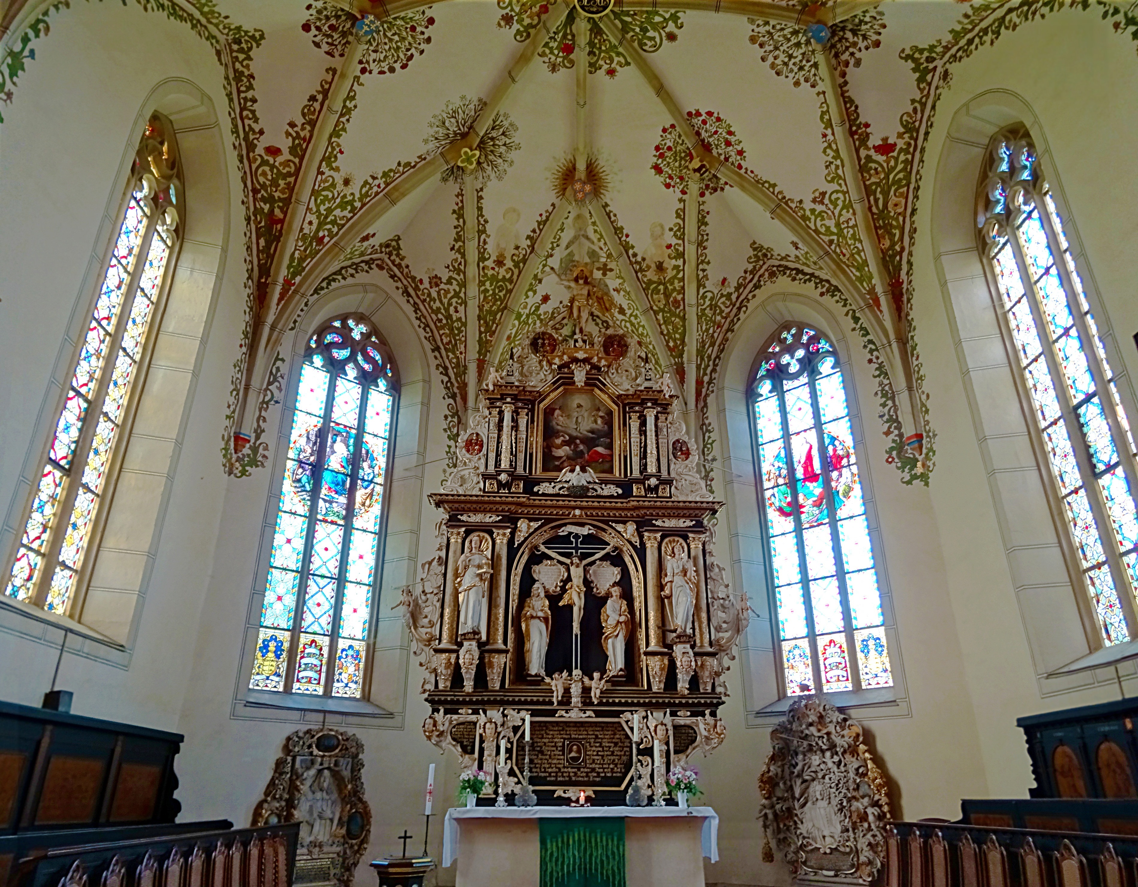 Chorraum der Bergkirche Sankt Marien, Schleiz